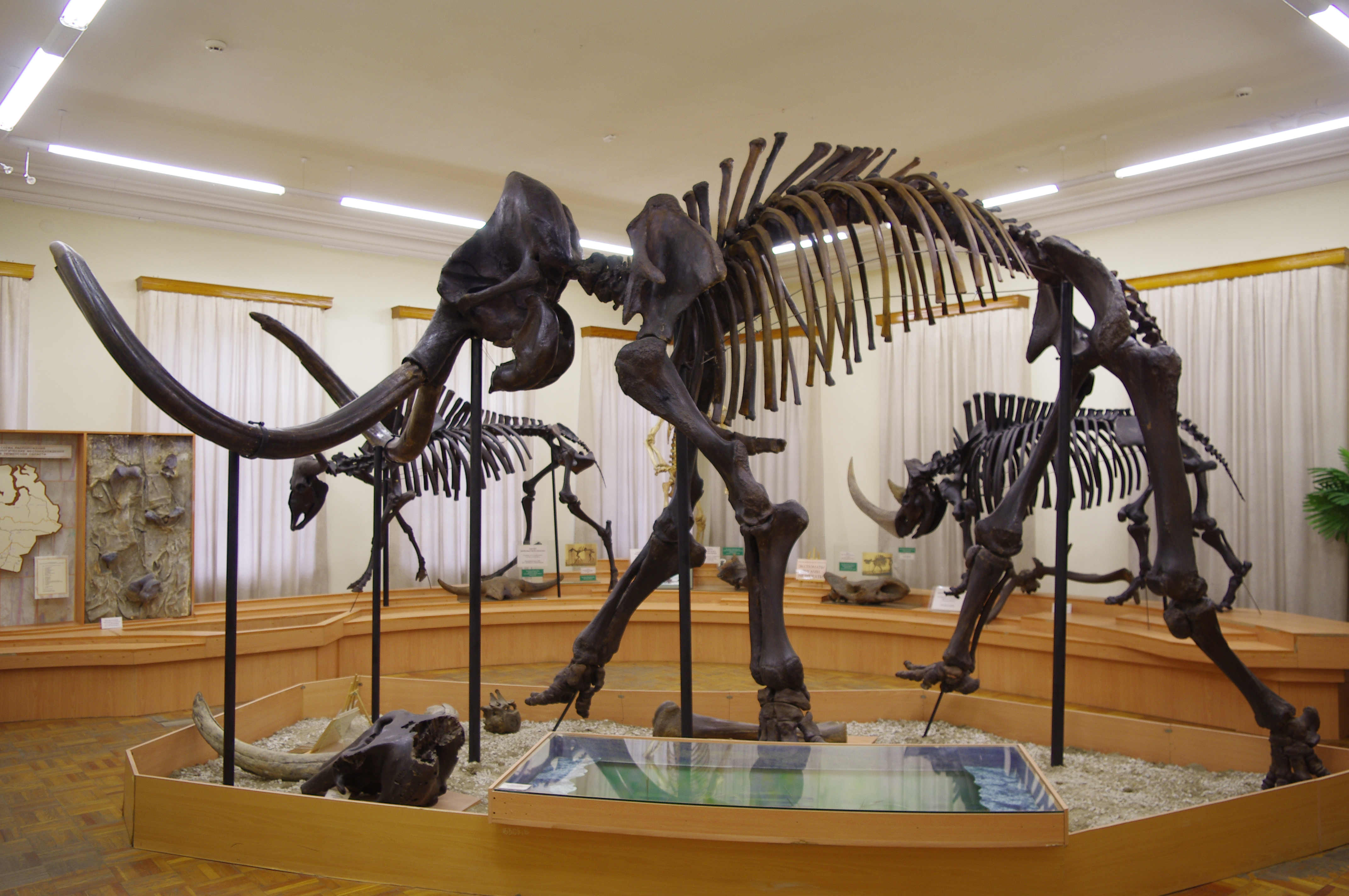 Mamut, lato 2013.